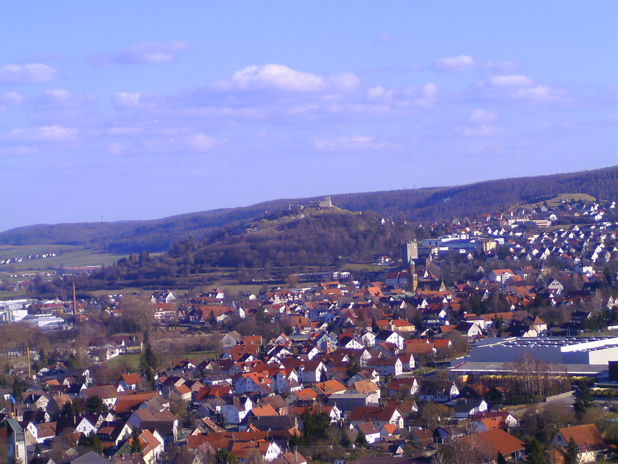 Bopfingen, Baden-Württemberg, Deutschland (Germany)